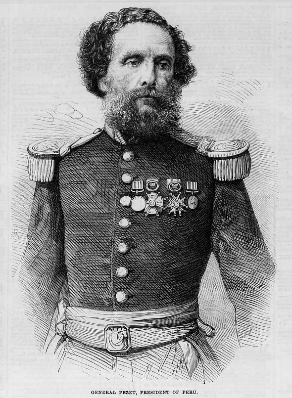 Juan Antonio Pezet (1809 – 24 March 1879)